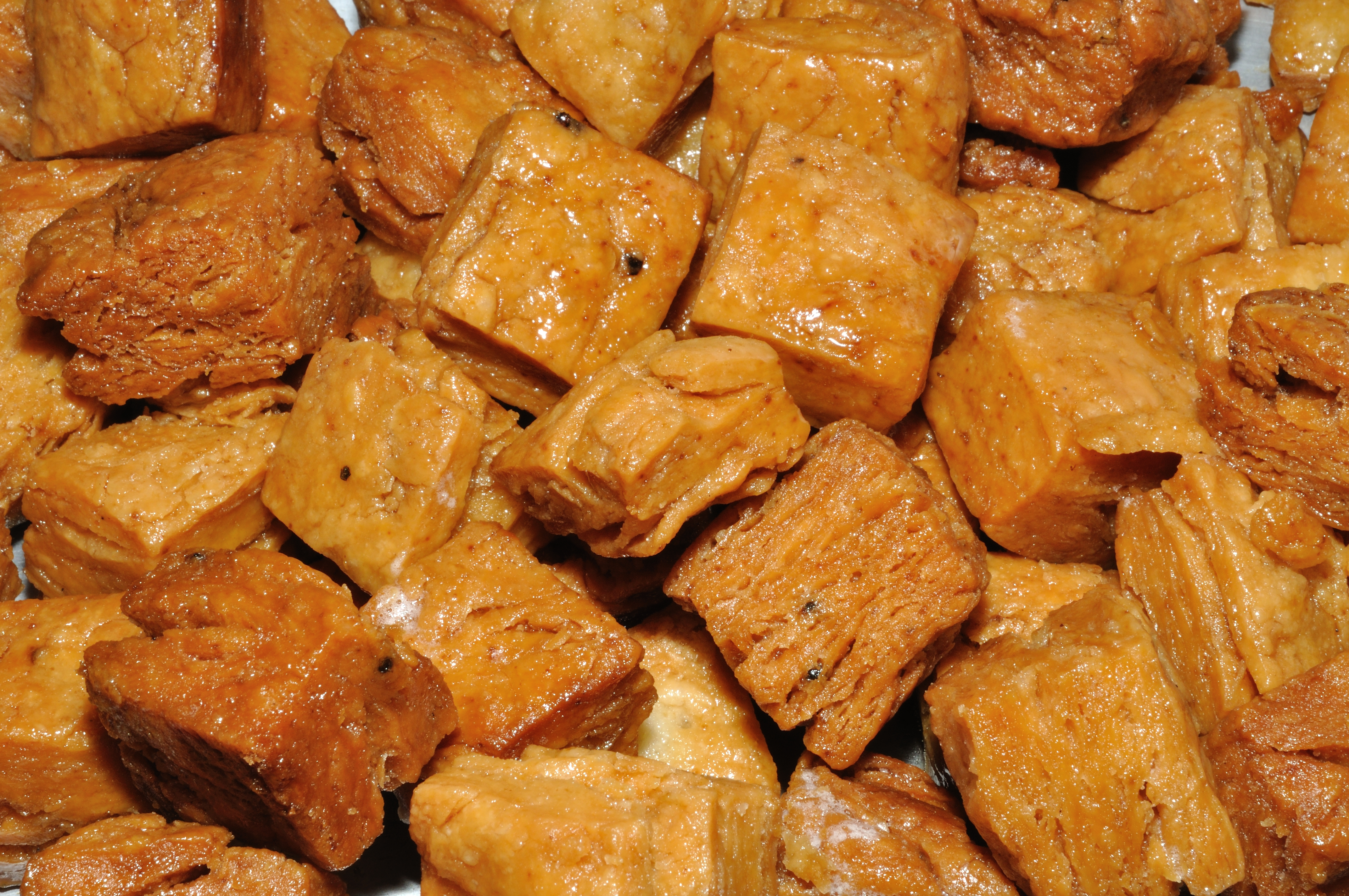 Bn: Gaja